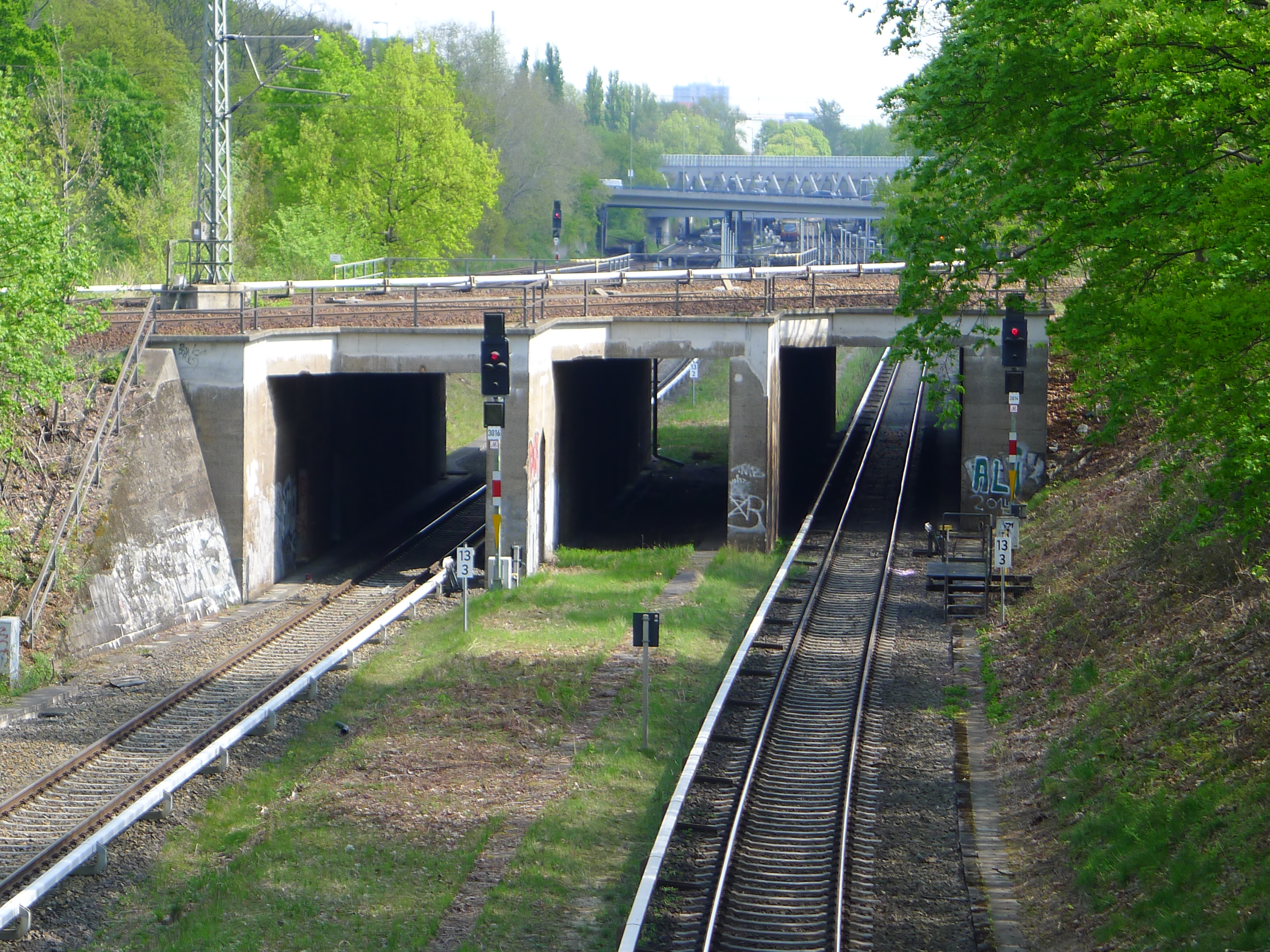 Eisenbahnbrücke über die S-Bahn